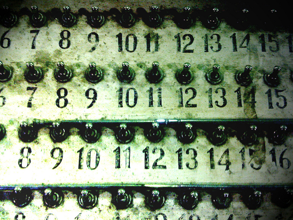 Tablero de cancha de bochas. Nuñez, Buenos Aires Argentina.